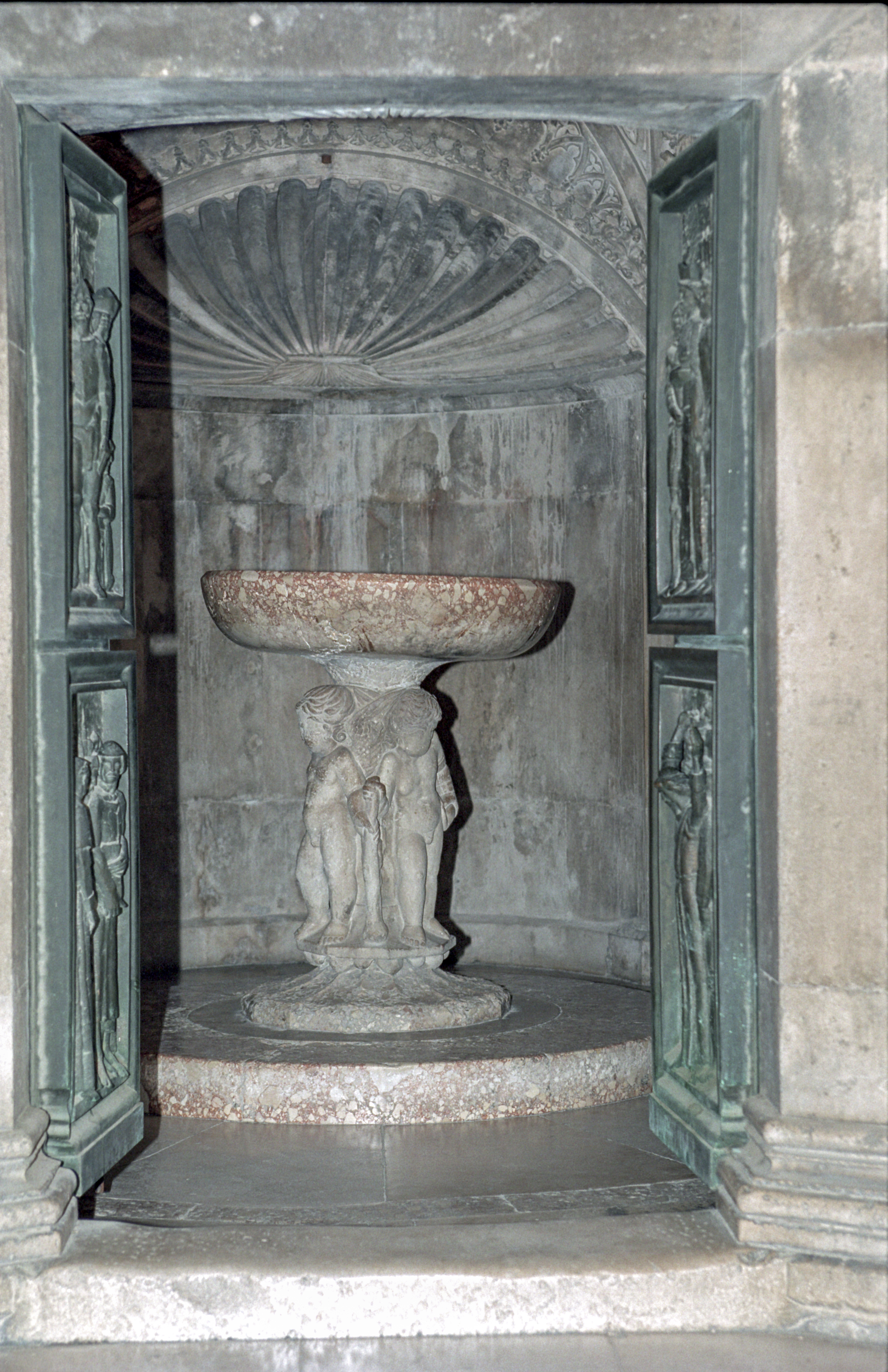 Šibenik, Baptistery